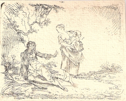 "Istuv mees rehaga ja naine korviga" (u. 1773-80). Ofort, paber.